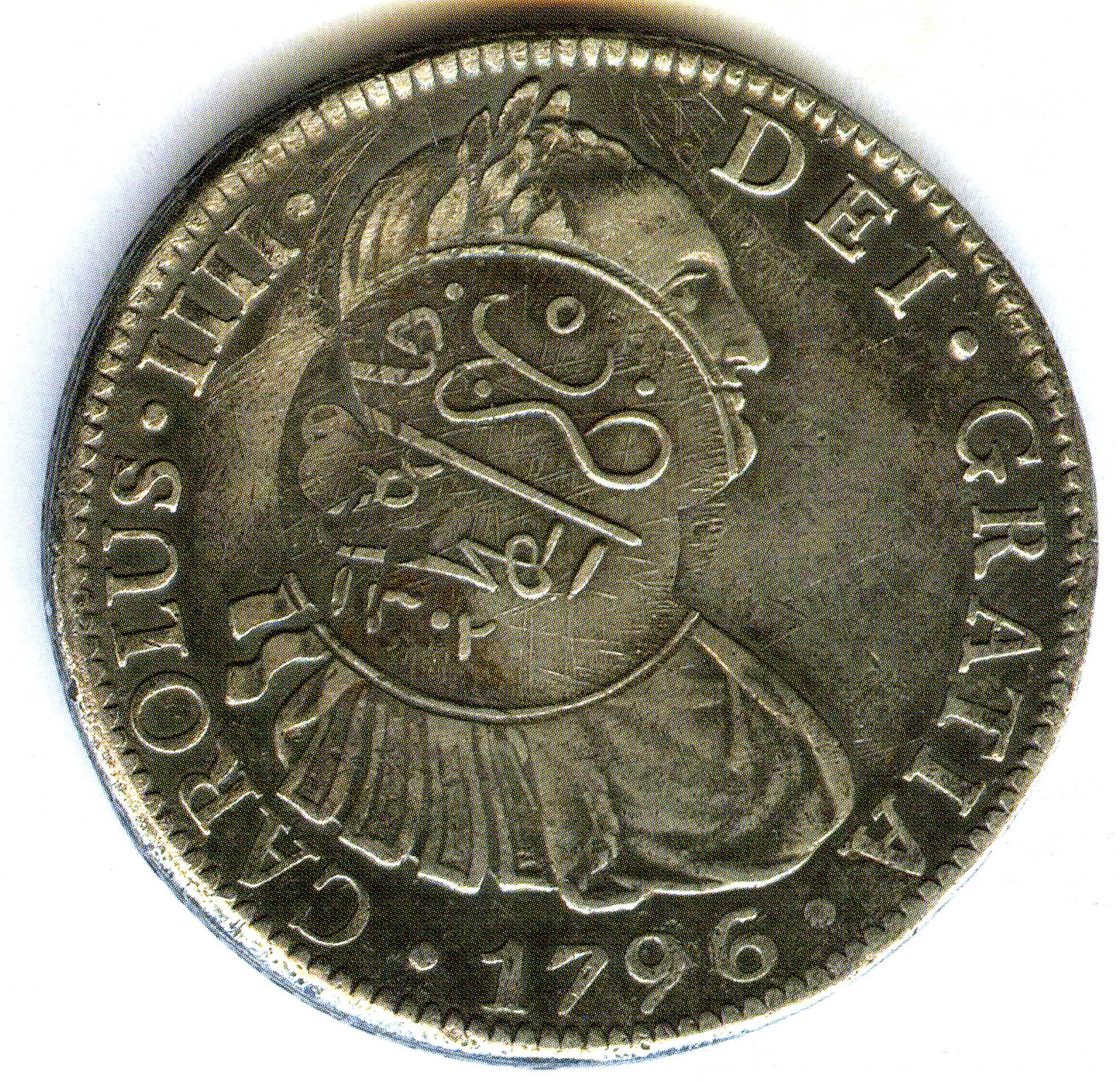 Moneda española de 8 reales que circuló en Sudán con resello.